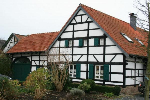 Fachwerkgehöft in Wegberg-Rickelrath